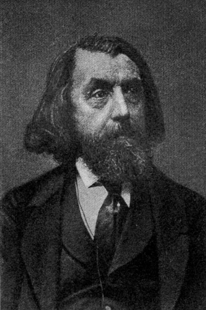 Karl Friedrich Ludwig Goedeke (1814–1887), German literary historian